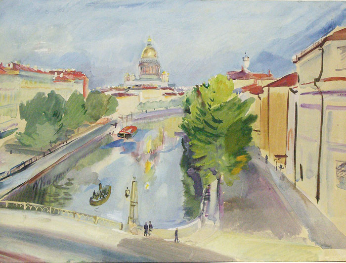 Картина А. А. Успенского "Виолончелист".